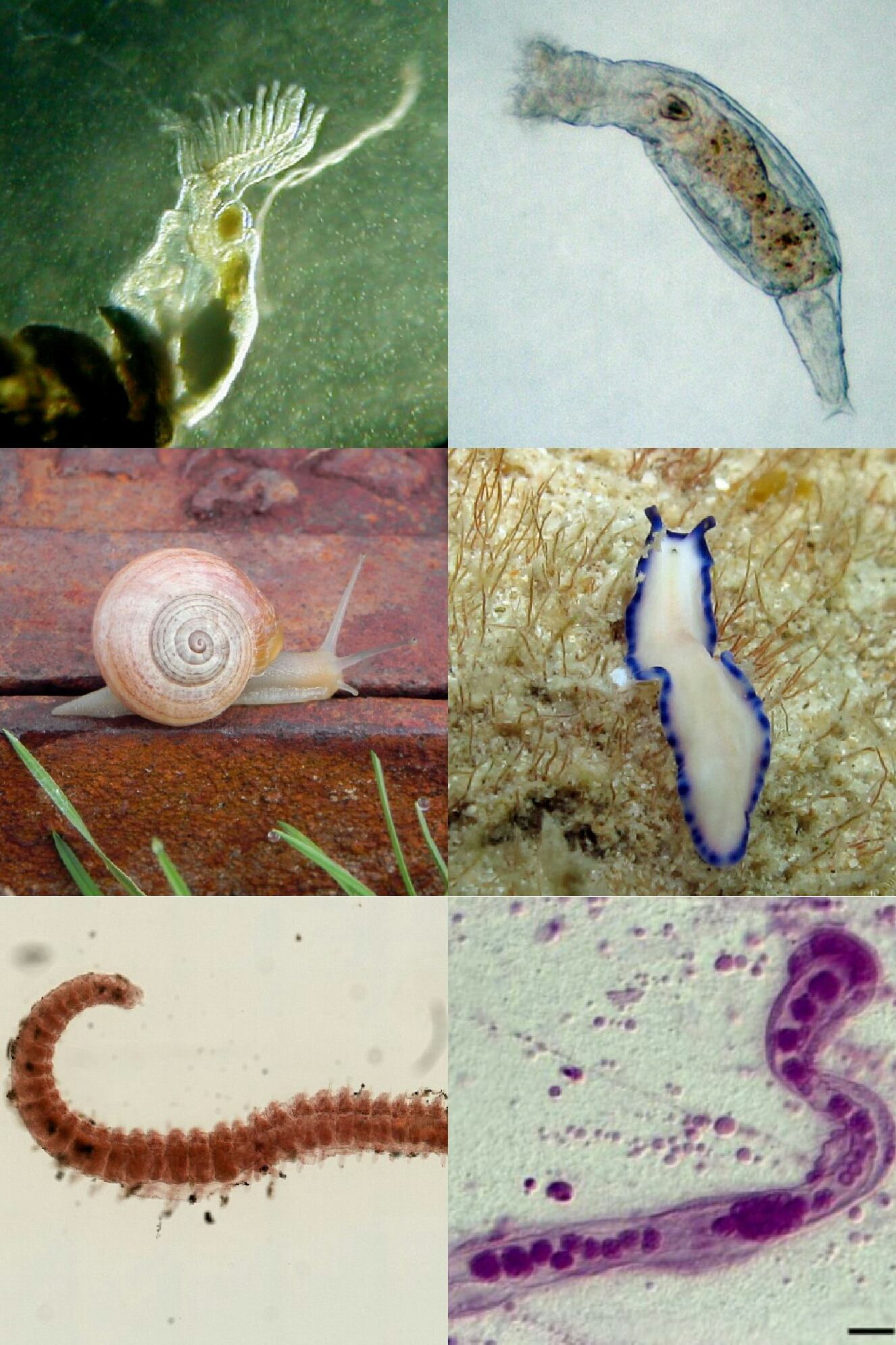 Collage animales espiralios basado en imágenes de Commons.